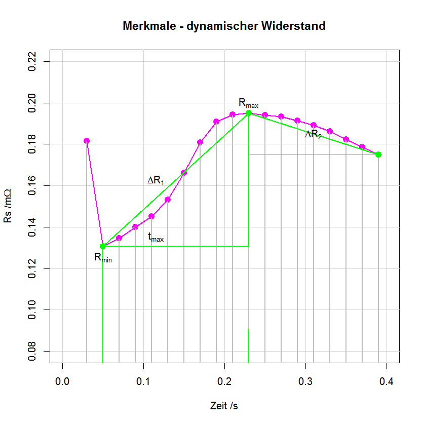 Merkmalsberechnung aus dem dynamischen Widerstand beim Widerstandspunktschweißen von Stahlblech mit Mittelfrequenz